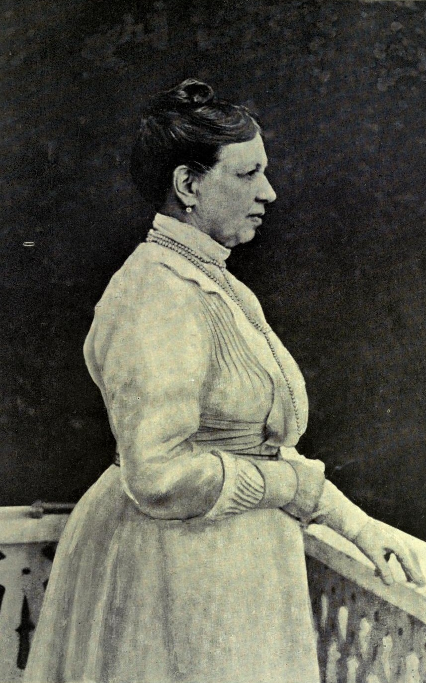 Sophia Tolstaya.